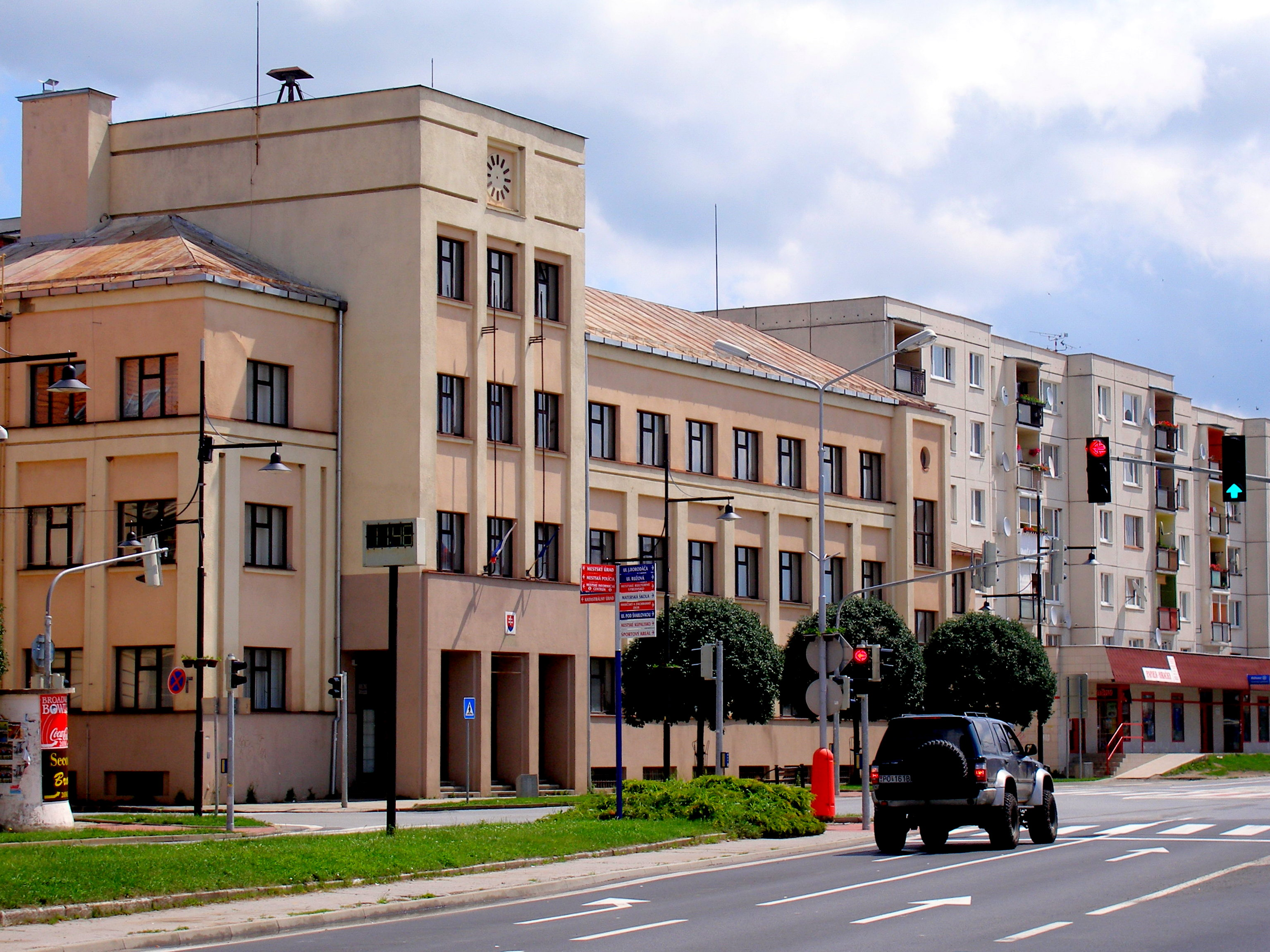 Mesto Sabinov okres Sabinov, kraj Prešov, región Šariš.